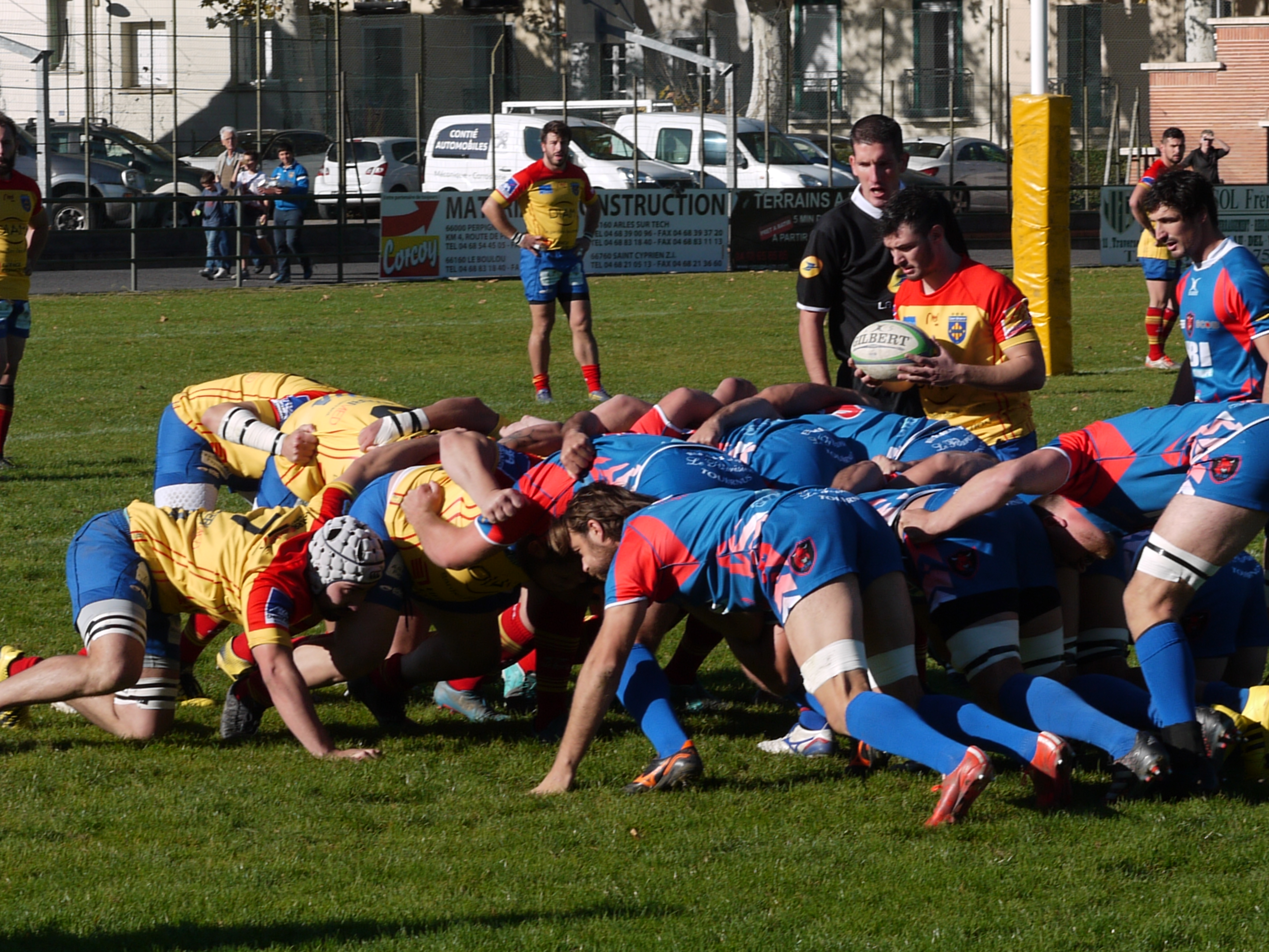 Le Céret sportif contre l'AS Macôn à Céret le 29 octobre 2017.